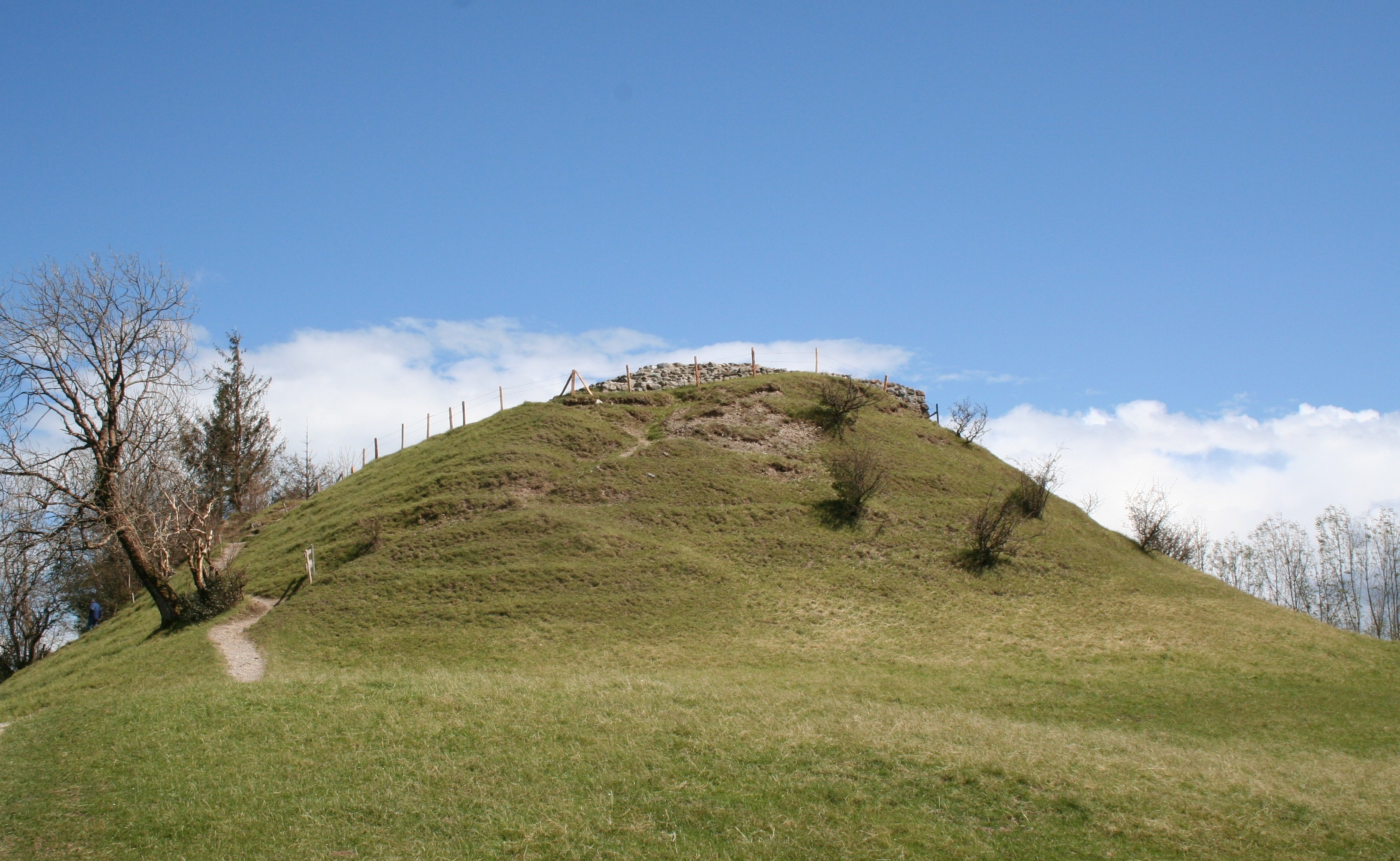 Ruine Schauenberg, Blick nach Osten